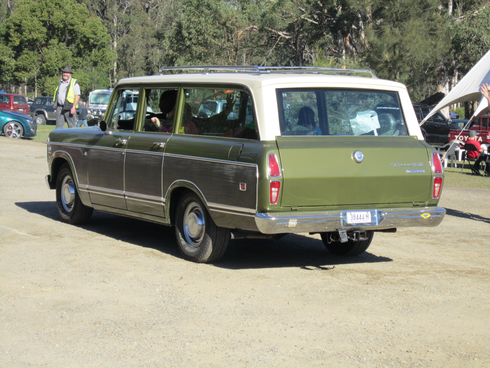 International Travelall